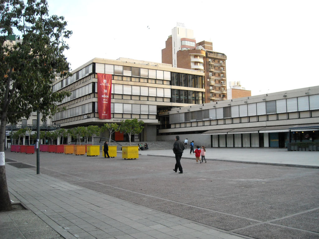 Centro Cultural Roberto Fontanarrosa. Rosario, Argentina.